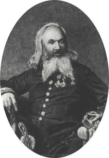 Nikolay Alexandrovich Motovilov